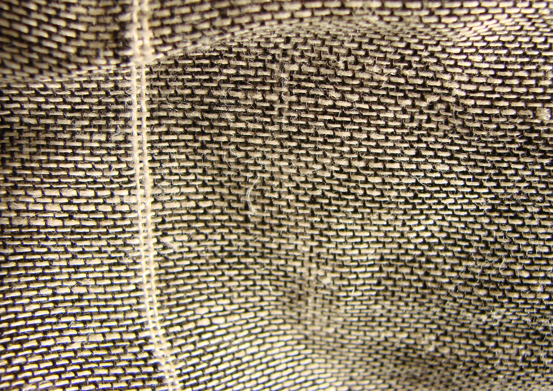 Linen